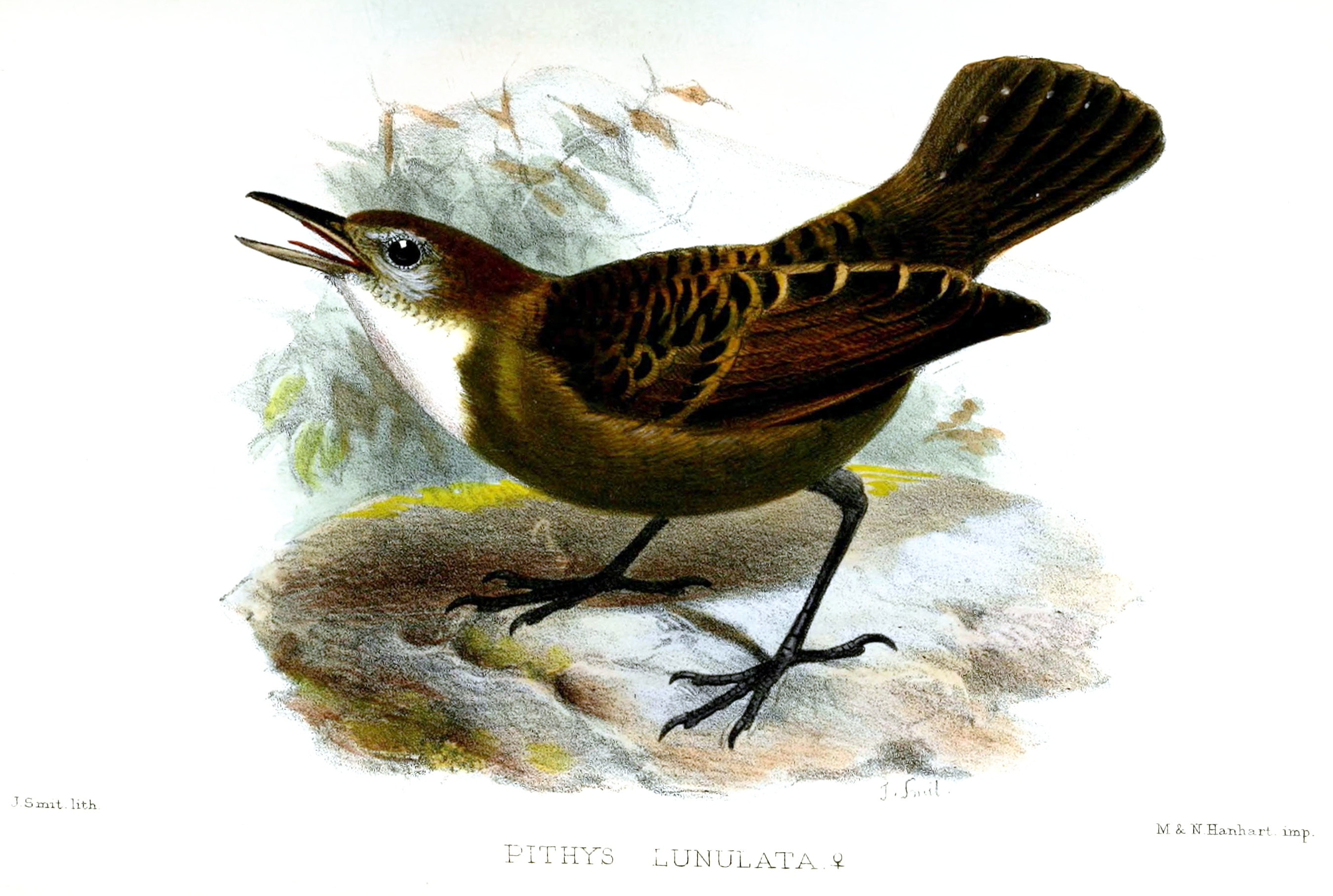 Pithys lunulata= Gymnopithys lunulatus